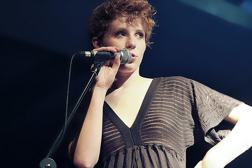 Alina Orlova @ Place